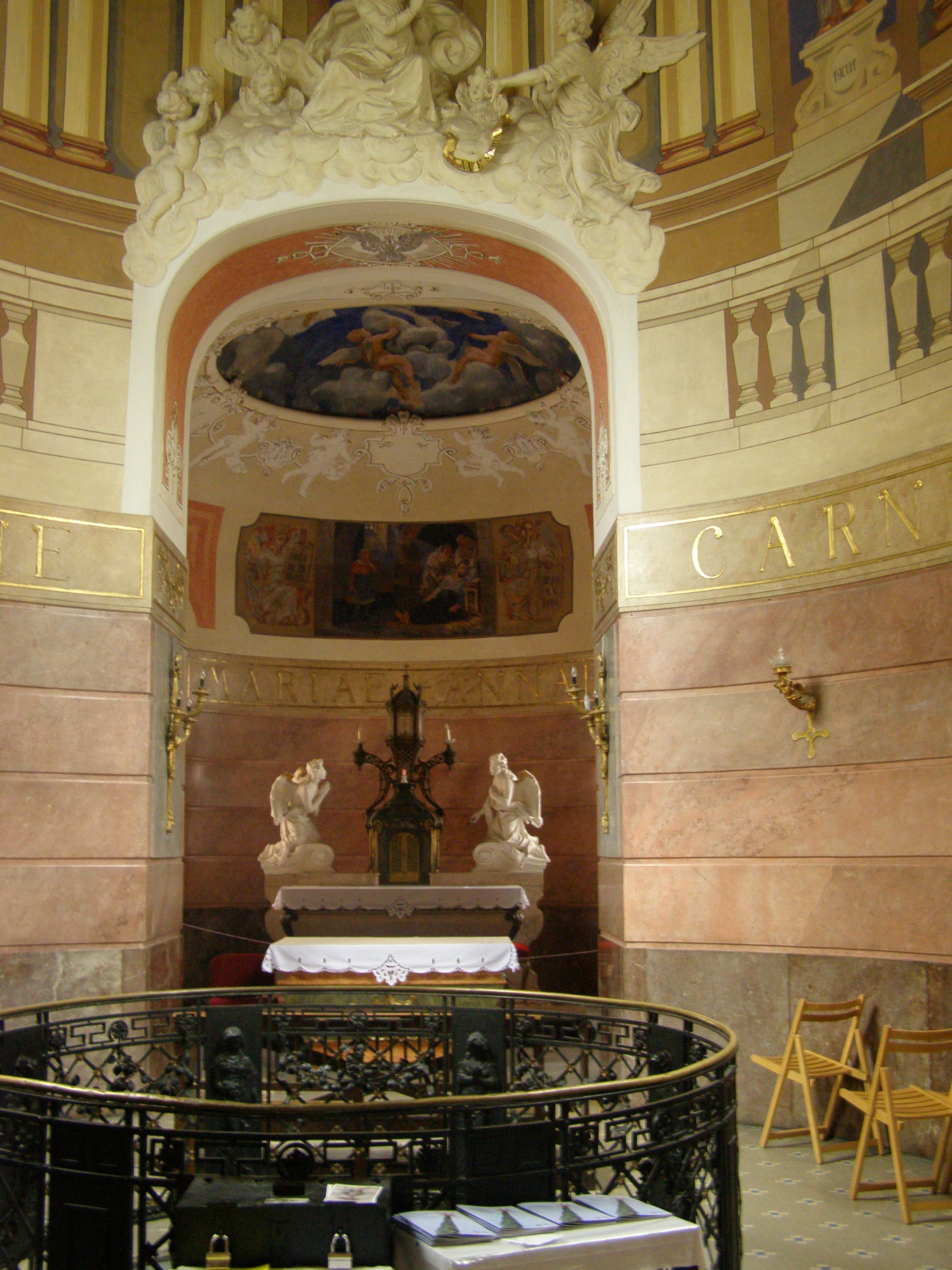 Kaple svatého Jana Sarkandra v Olomouci, interiér.